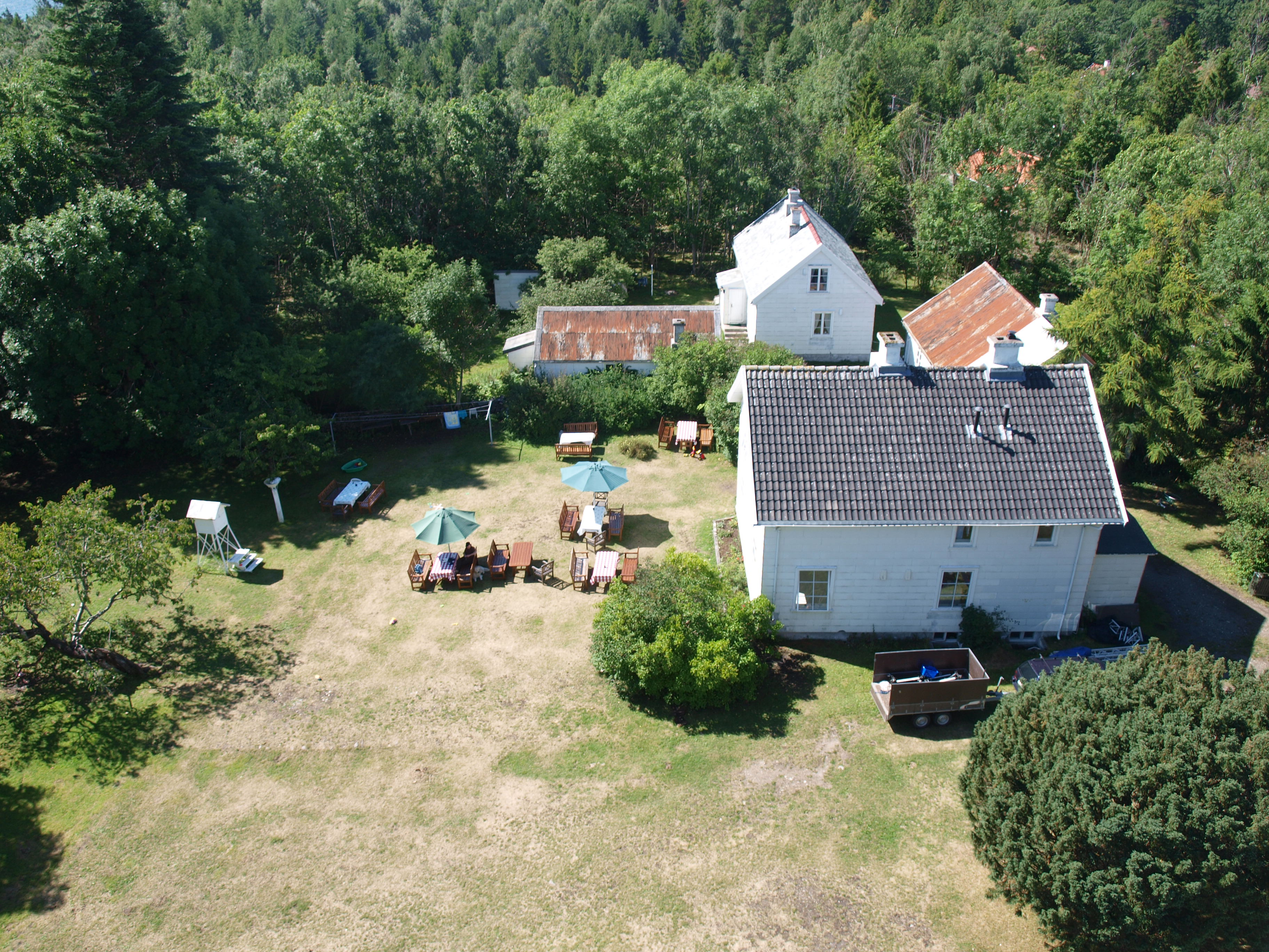 Fyrvokterboligen ved fyret på Jomfruland utenfor Kragerø.